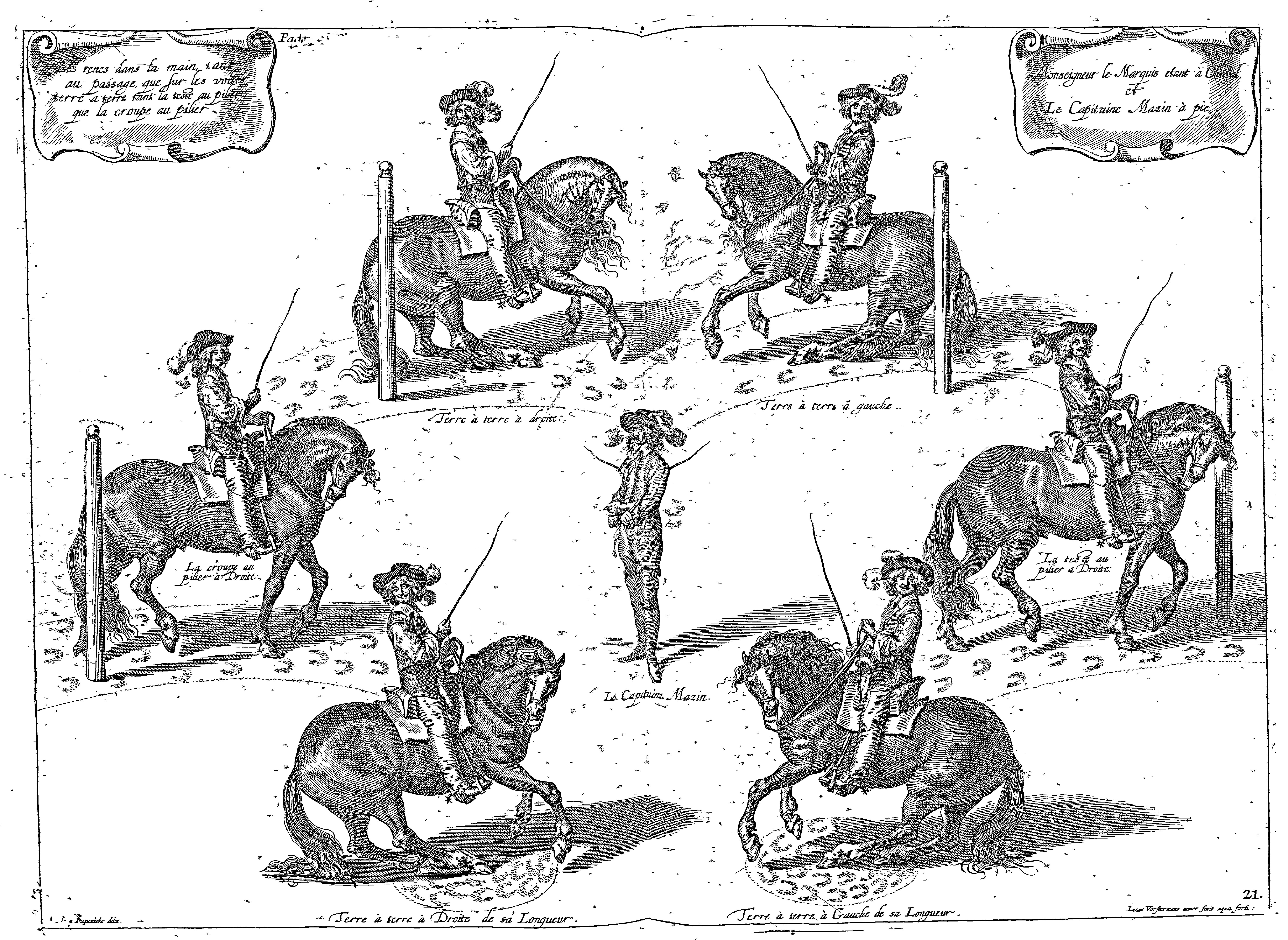 Illustrations from File:Cavendish - L’Art de dresser les chevaux, 1737.djvu